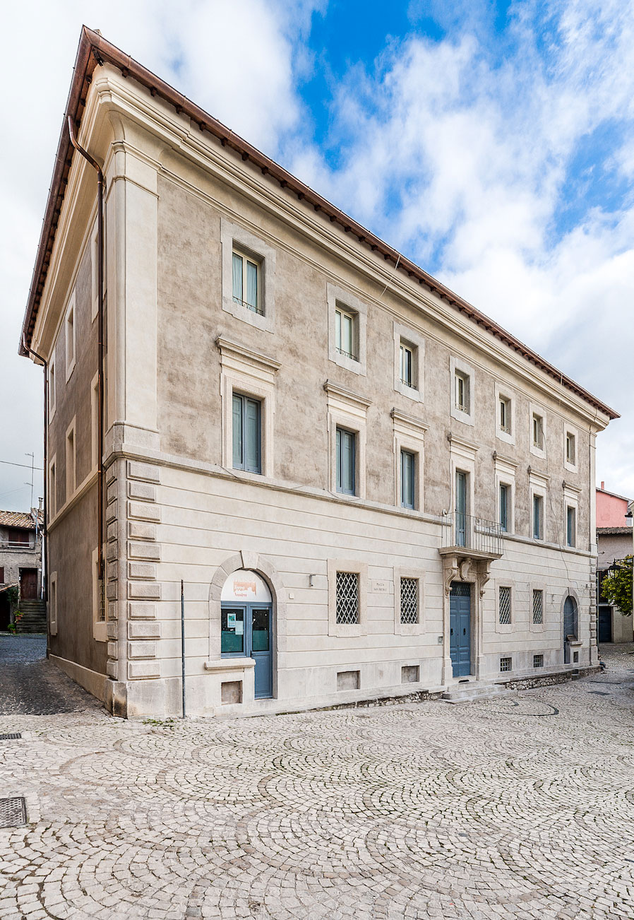 Palazzo Mocci, sede del Centro Visitatori del Museo Diffuso